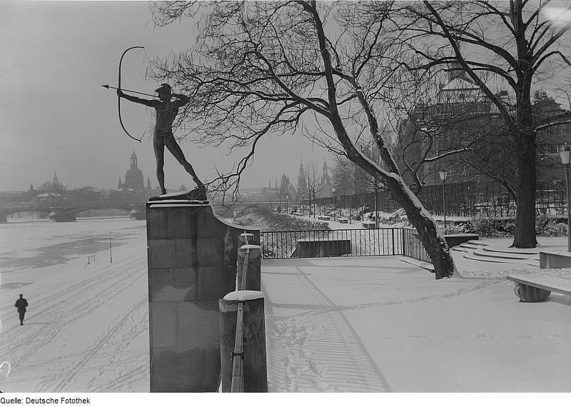 Original image description from the Deutsche Fotothek Dresden. Blick vom rechten Elbufer mit der Plastik "Bogenschütze" gegen die Altstadt (Königsufer)